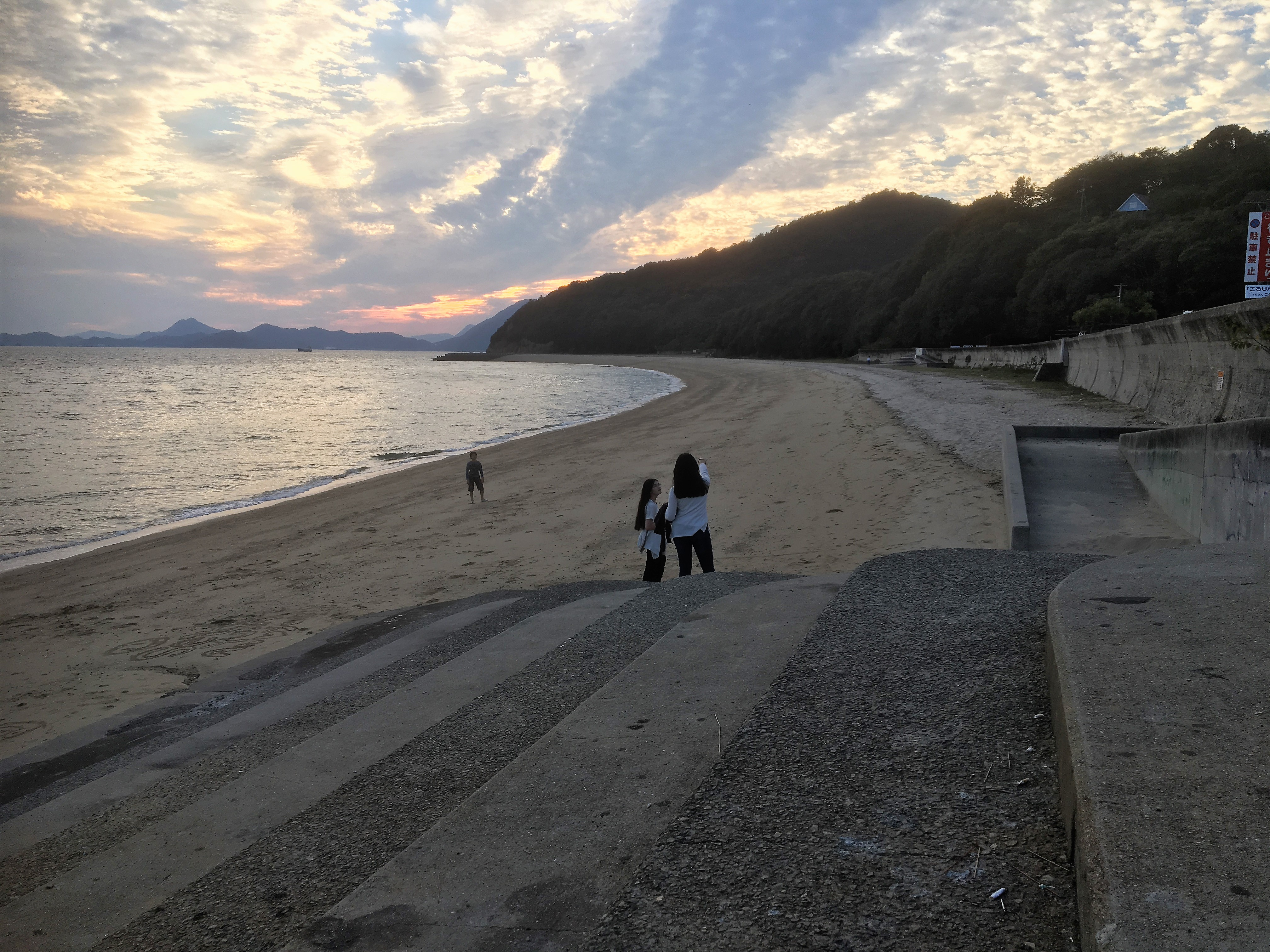 広島県福山市横島の南西海岸にある横山海水浴場